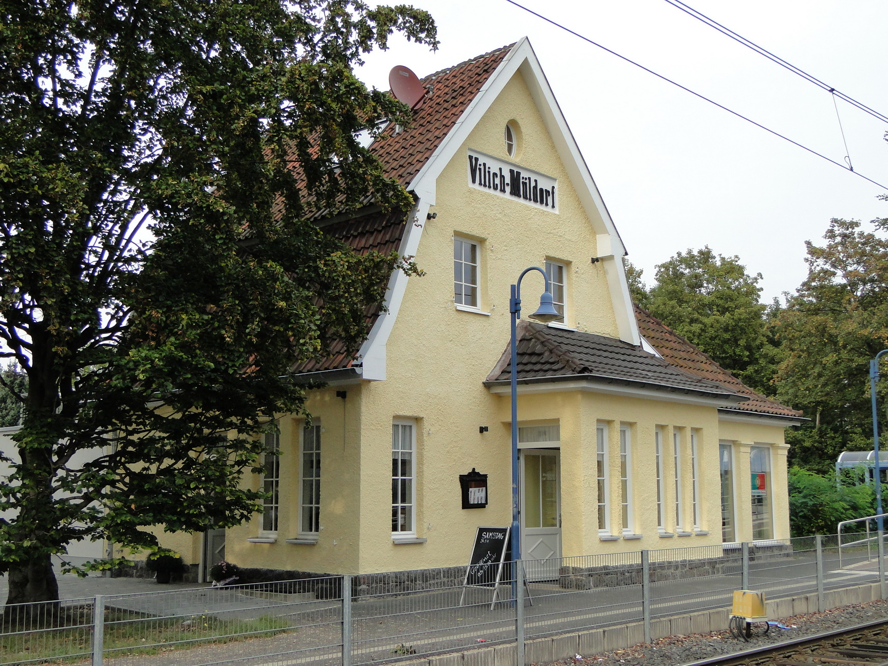 Das ehemalige Bahnhofsgebäude in Vilich-Müldorf, Am Herrengarten 63